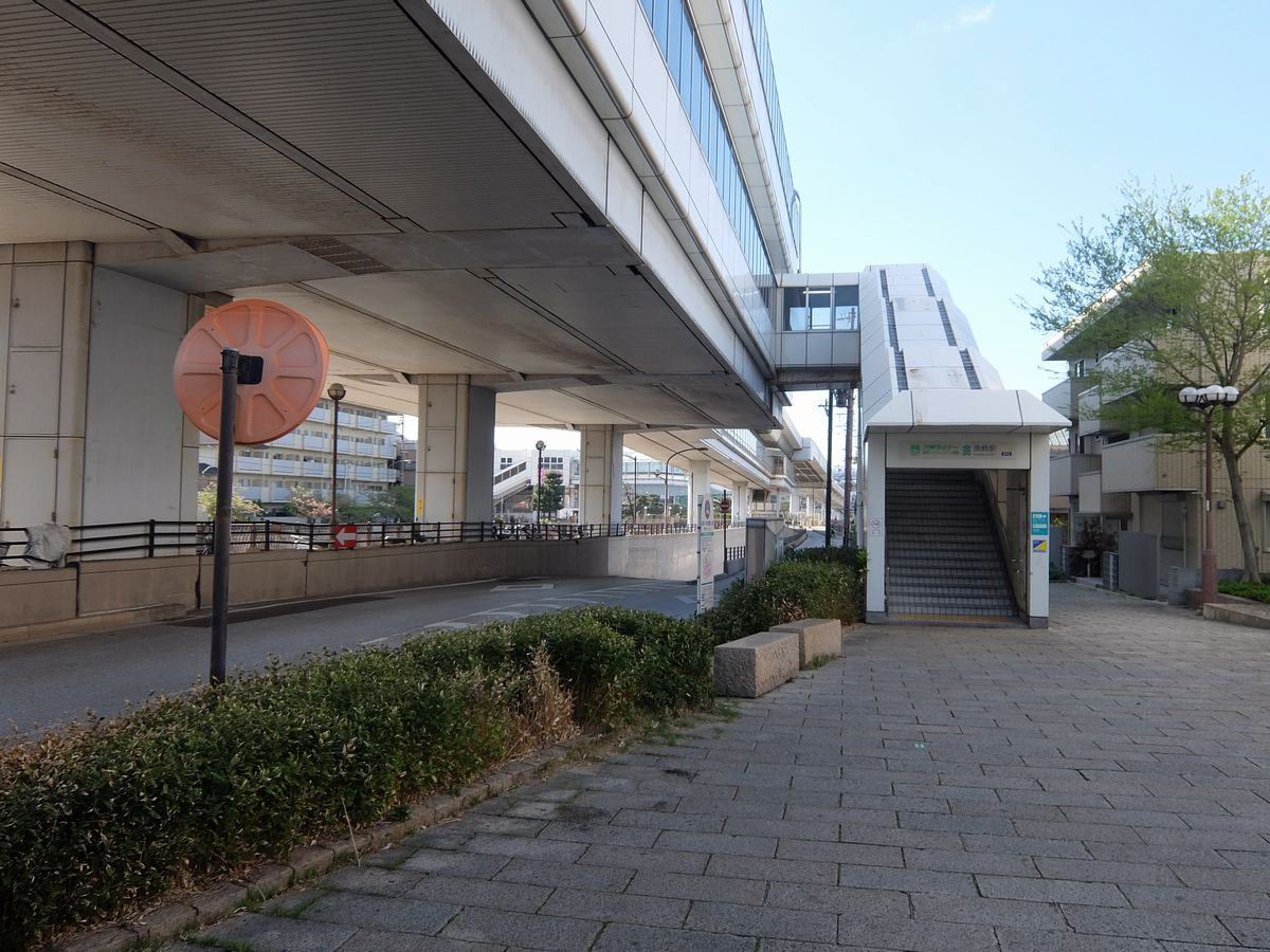 神戸新交通（六甲ライナー）魚崎駅出入口（神戸市東灘区魚崎西町四丁目）